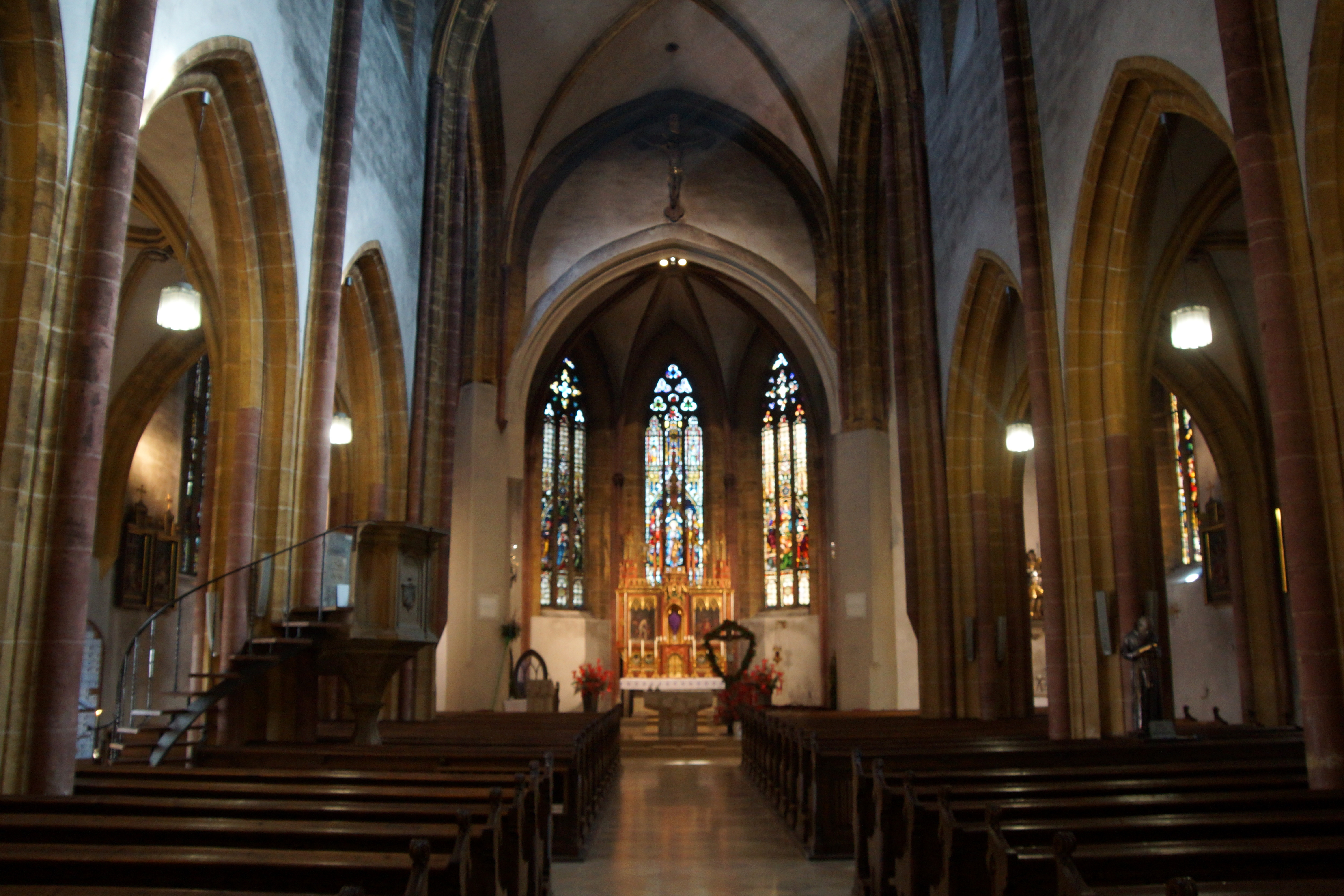 Die Pfarrkirche St. Johann Baptist in Nabburg